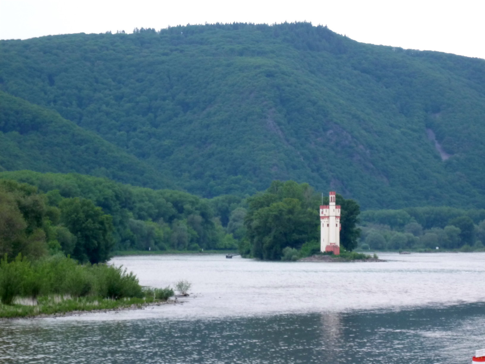 Bingen: Blick auf das Mittelrheintal mit dem Mäuseturm, aufgenommen vom Zusammenfluss der Nahe in den Rhein.